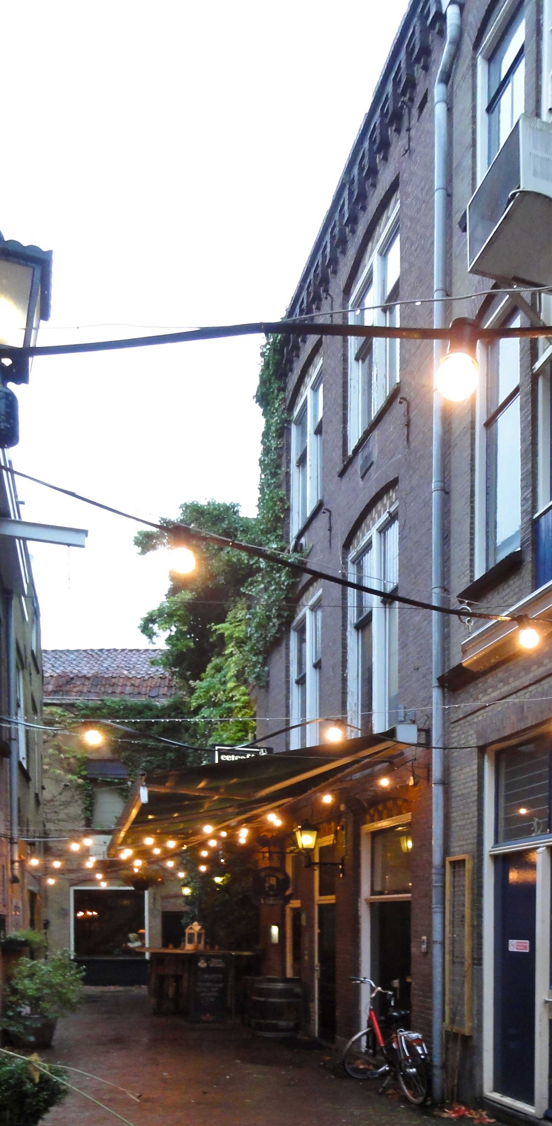 Het pandje aan de Koster Gijzensteeg 6a vormt de achterzijde van een complex, dat met de voorzijde aan de Markt 12 en 13 van Gouda is gelegen en waarvan nr. 12 het hoofdpand is